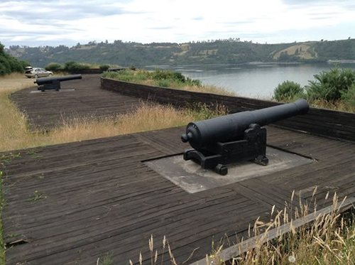 Explanada del Fuerte Tauco